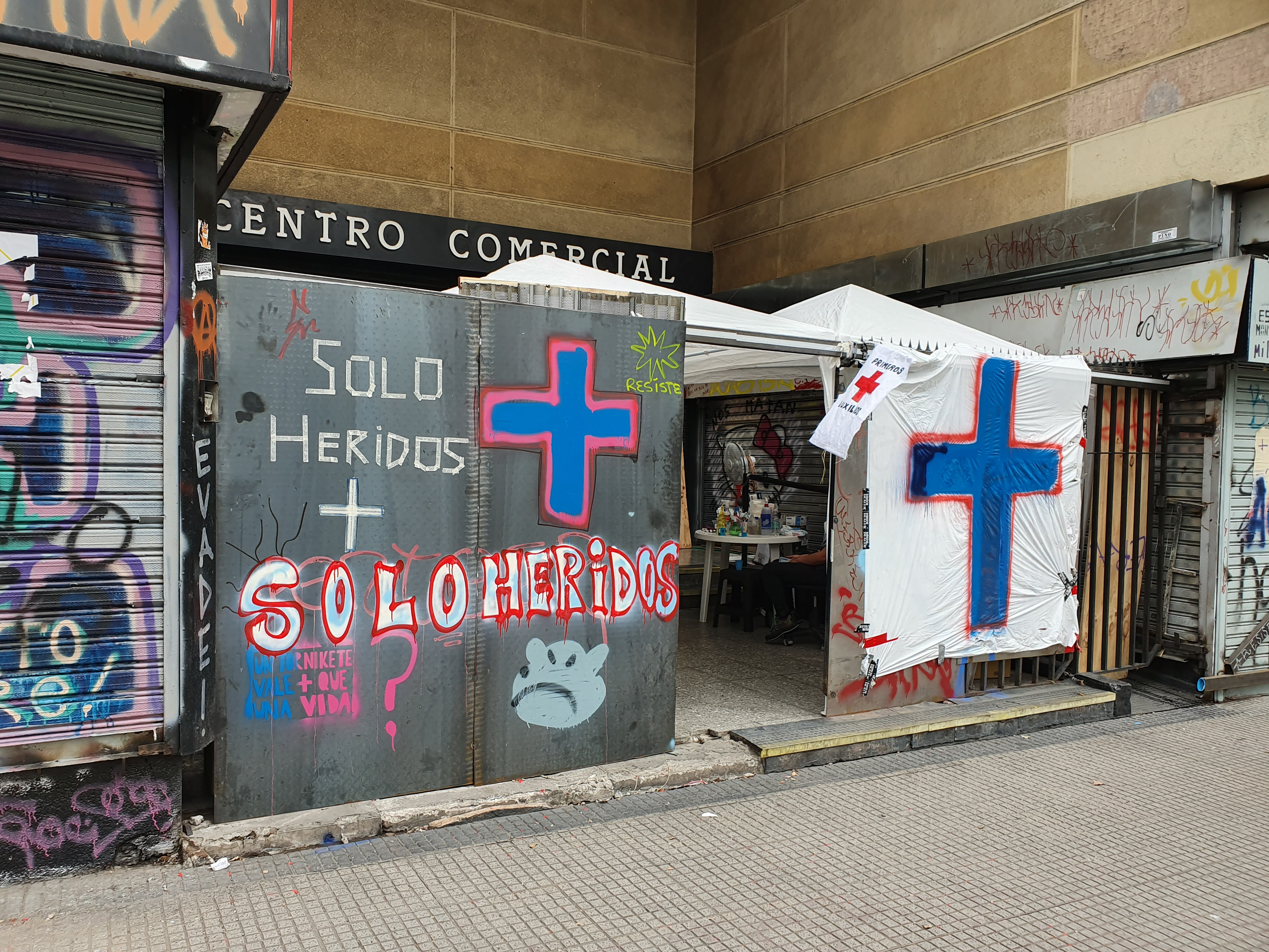 Puesto de atención de primeros auxilios en Plaza Baquedano, durante las protestas en Chile de 2019.